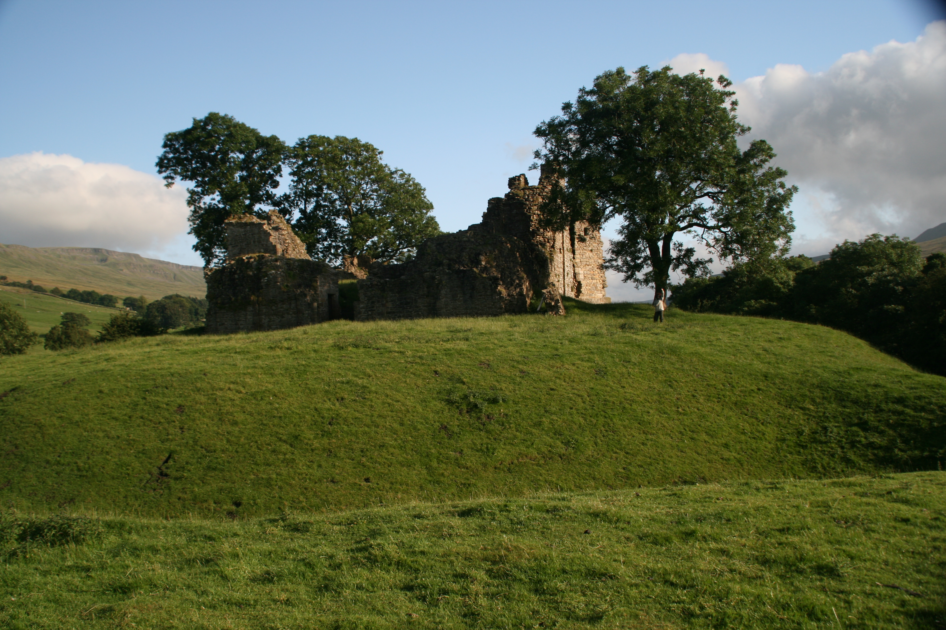 El Castillo de Pendragón en la región inglesa de Cumbria.